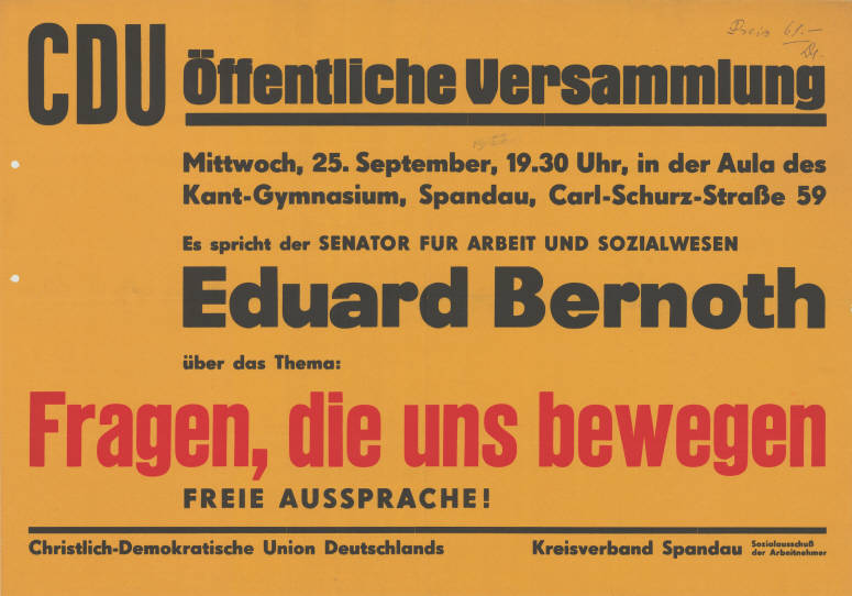 CDU Öffentliche Versammlung ... Es spricht der Senator für Arbeit und Sozialwesen Eduard Bernoth über das Thema: Fragen, die uns bewegen Freie Aussprache Christlich-Demokratische Union Deutschlands Kreisverband Spandau Sozialausschuß der Arbeitnehmer Plakatart: Ankündigungsplakat Auftraggeber: KV Spandau Sozialausschuß der Arbeitnehmer Objekt-Signatur: 10-031 : 268 Bestand: CDU-Plakate (10-031) GliederungBestand10-18: CDU-Plakate (10-031) » Ankündigungsplakate » 1950 - 1959 Lizenz: KAS/ACDP 10-031 : 268 CC-BY-SA 3.0 DE